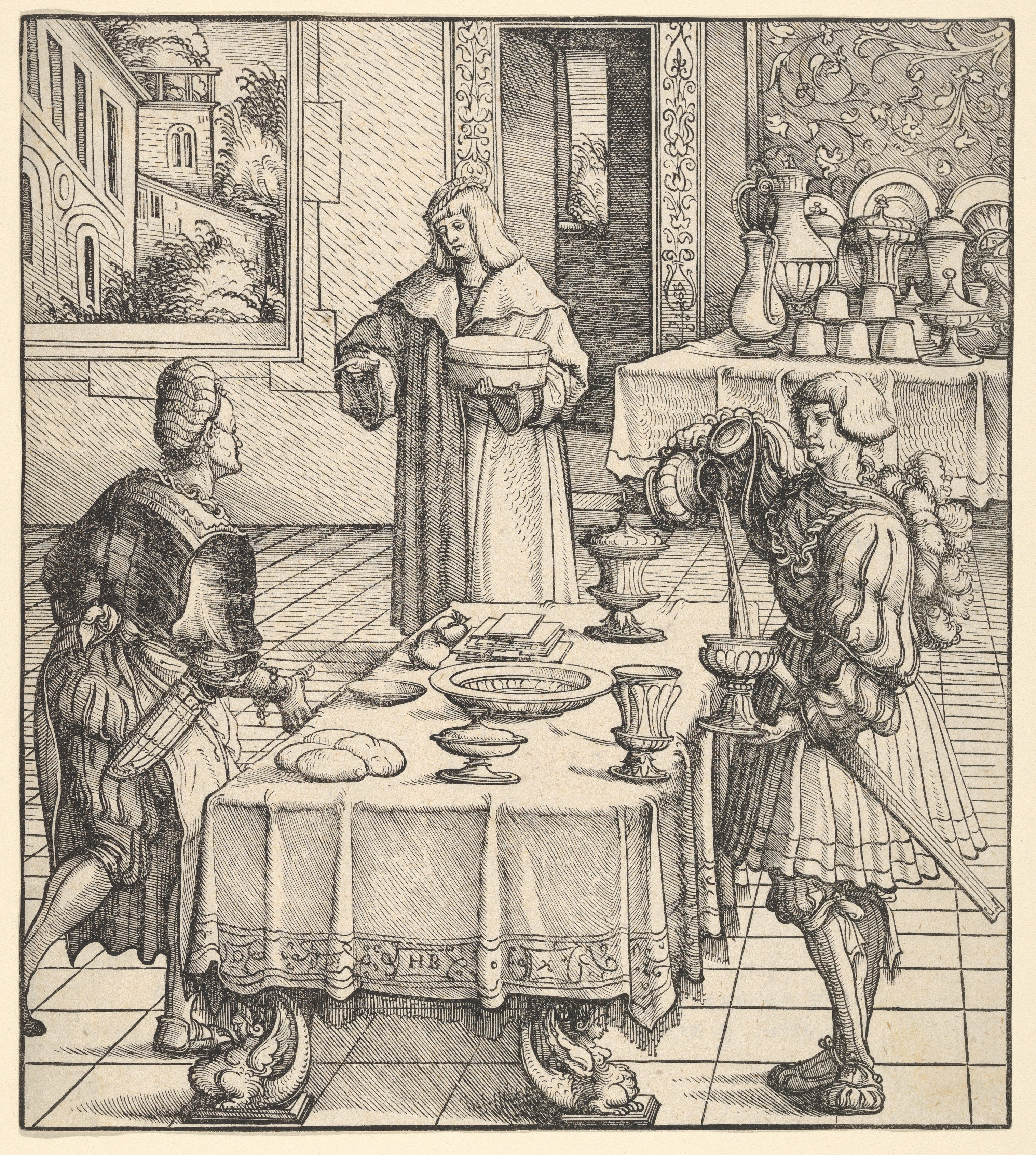 Woodcut. From Der Weisskunig.